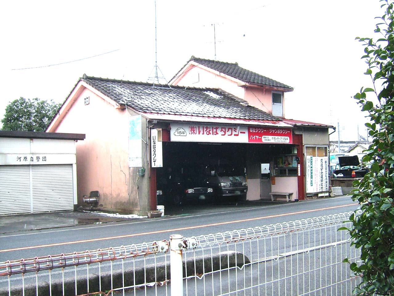 いなばタクシー